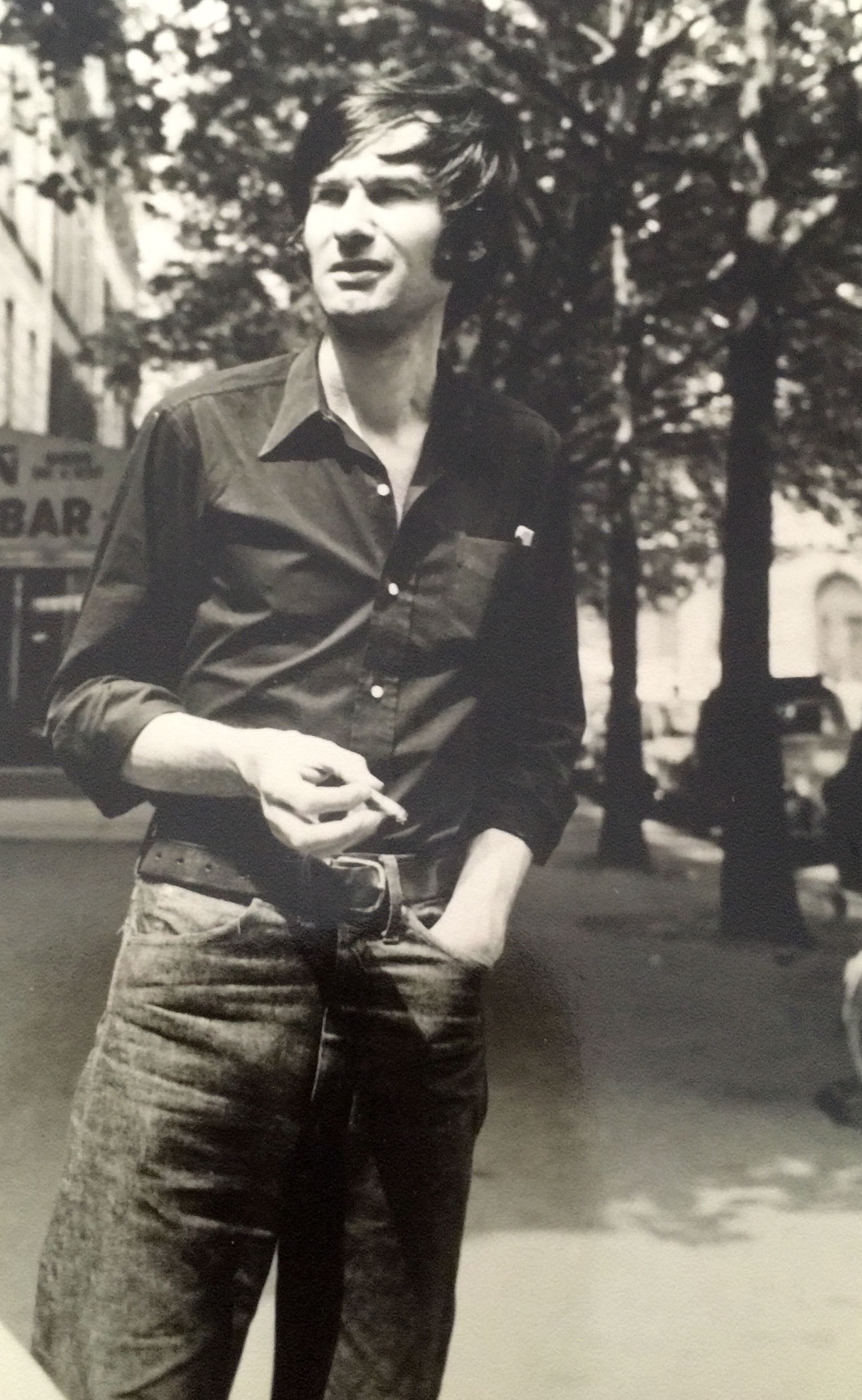 Portrait de Pierre Pinalie à Paris en 1969